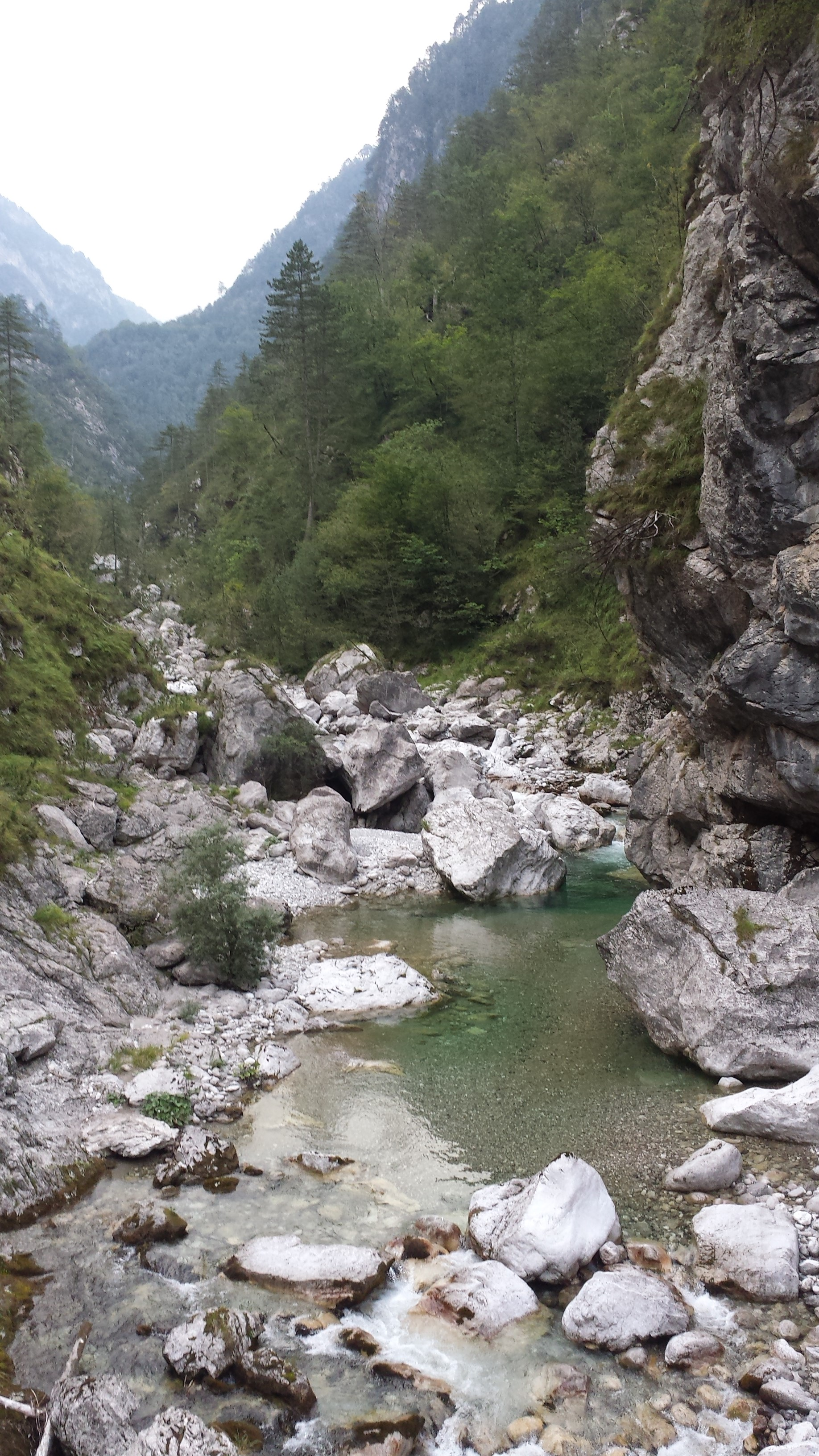 Il Meduna nel suo alto corso